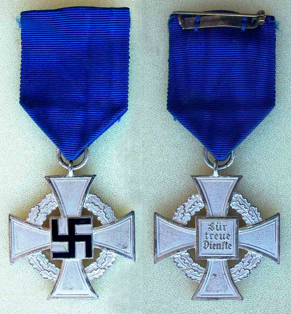 Treuedienst-Ehrenzeichen der 2. Stufe für 25 Jahre treue Dienstleistung. Gestiftet von Adolf Hitler für Beamte und Angestellte, verliehen von 1938-43